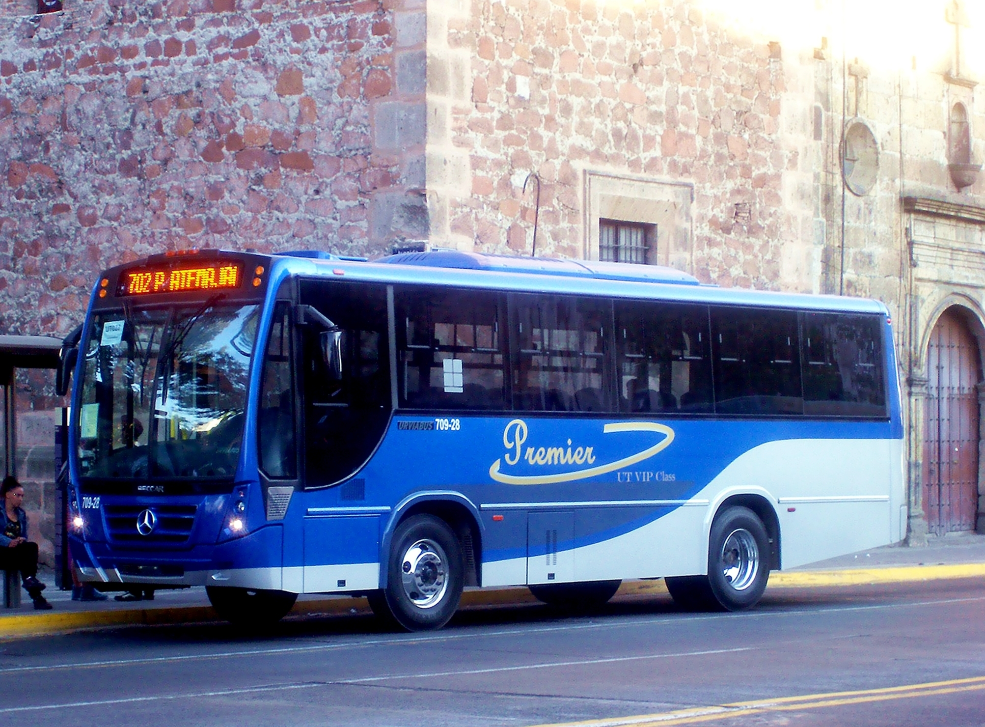 Autobus de lujo Premier VIP Class